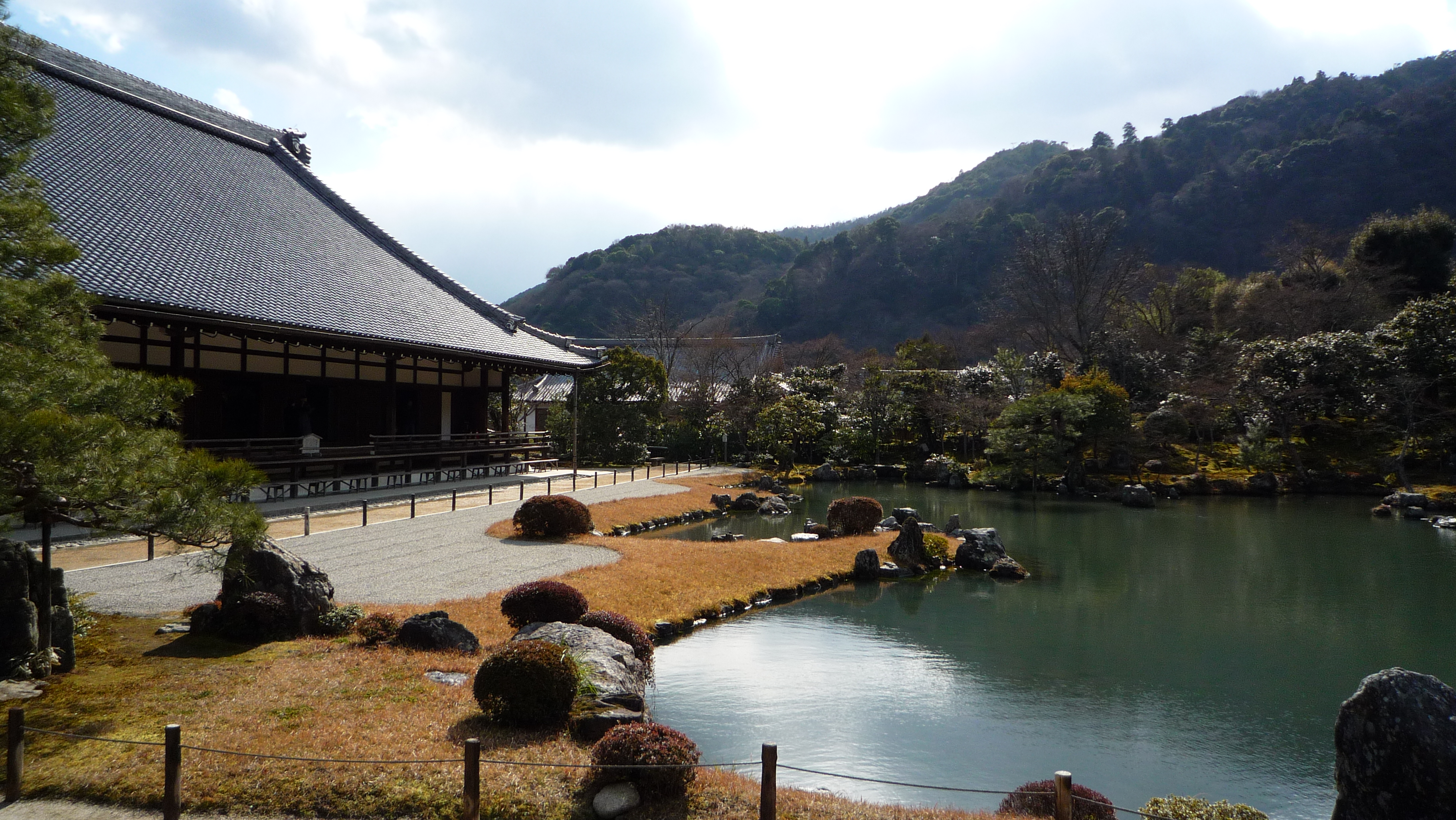 京都府京都市右京区 天龍寺